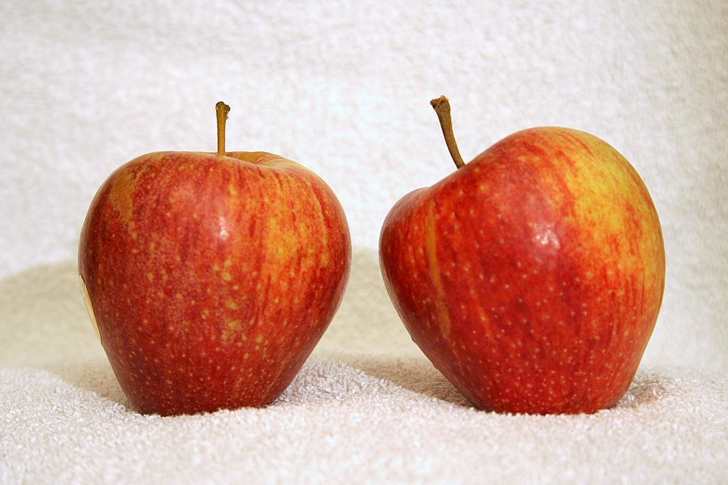 Cameo apple - Pomme Cameo